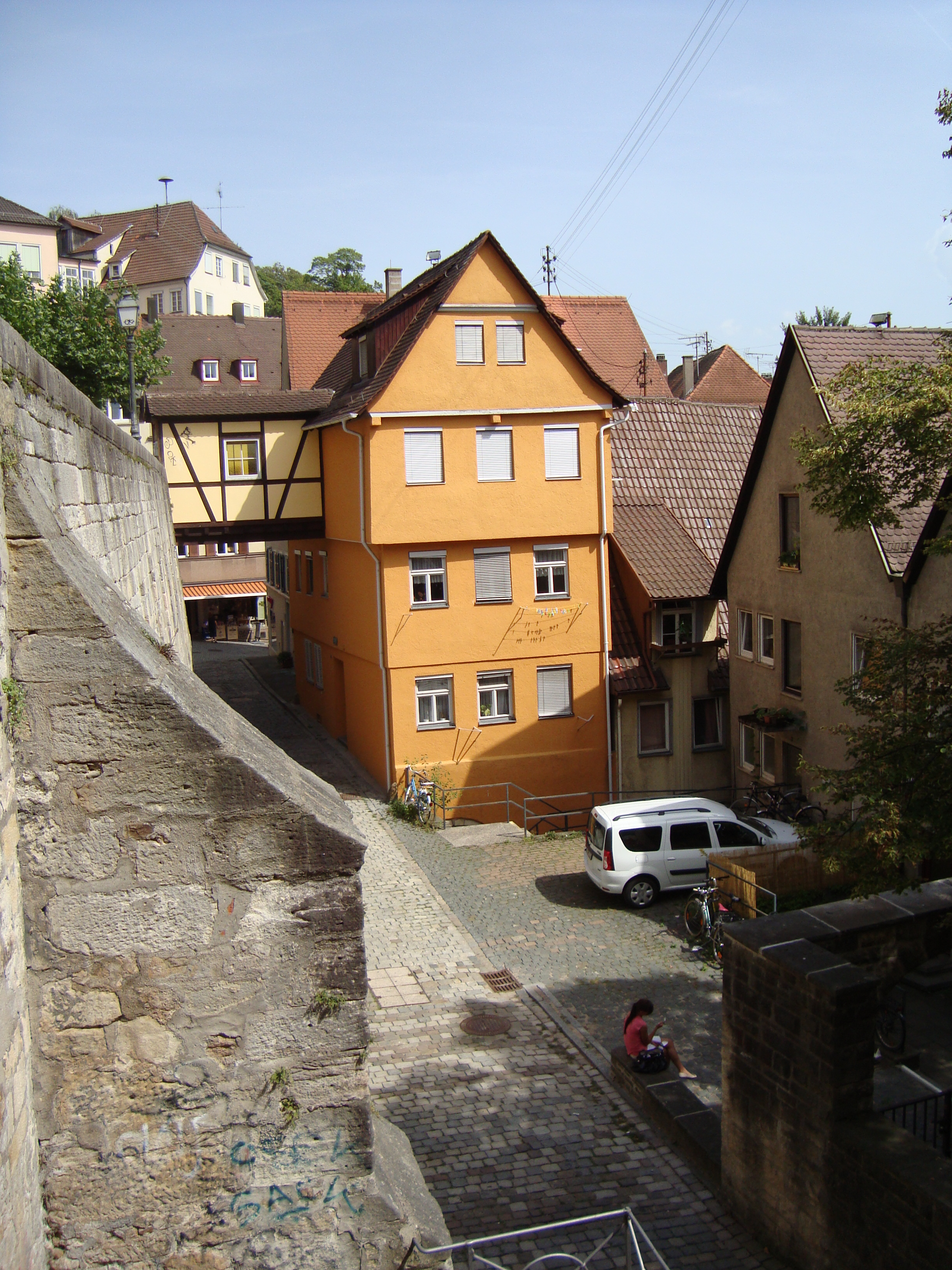 Nicodemus Frischlins Wohnhaus in der Clinicumsgasse in Tübingen, mit dem oberen Zugang von der Münzgasse